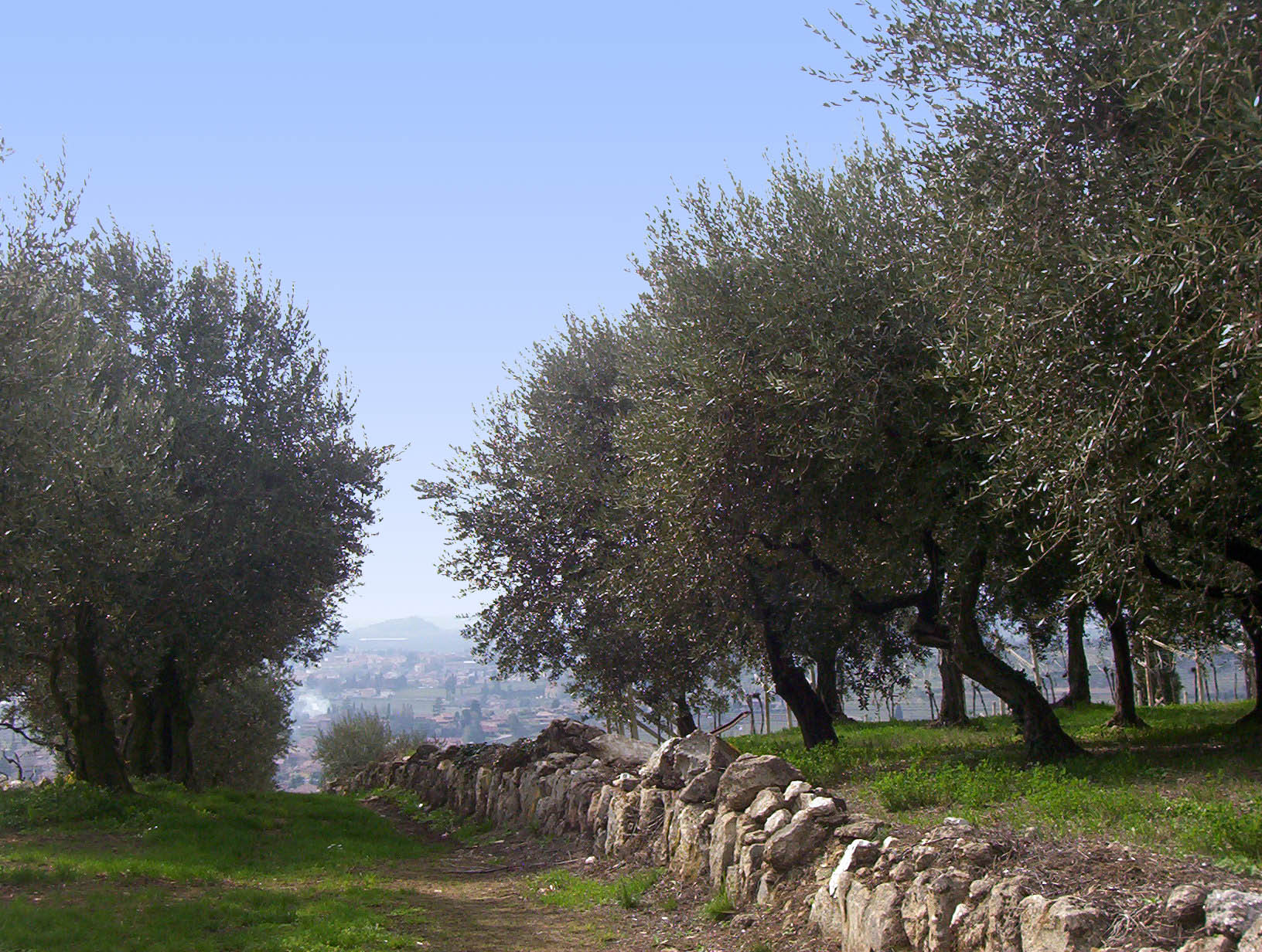 Vista di olivi della valpolicella